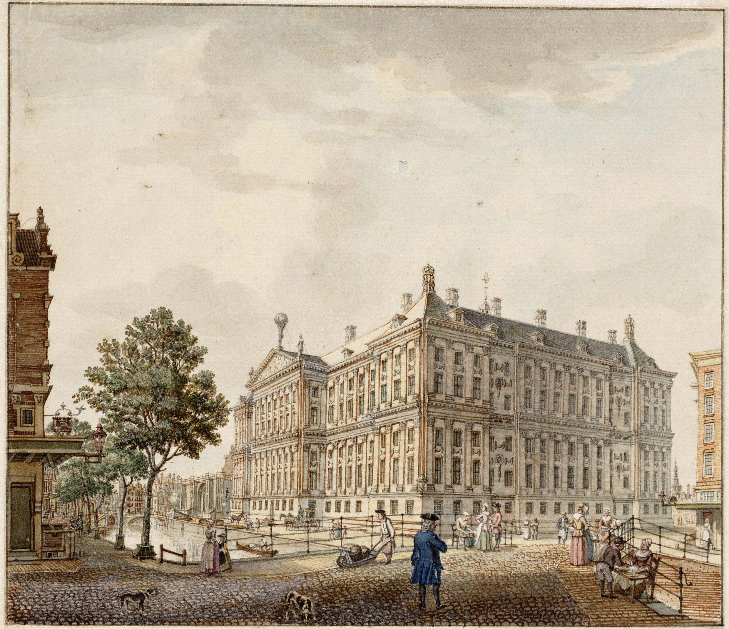 Beschrijving Stadhuis De Nieuwezijds Voorburgwal met op nummer 147 de achtergevel van het stadhuis, tegenwoordig het Koninklijk Paleis op de Dam. Links op de hoek van de Stilsteeg (de huidige Paleisstraat) het huis aan Nieuwezijds Voorburgwal 228. Rechts op de hoek van de Gasthuisstraat (tegenwoordig ook Paleisstraat) Nieuwezijds Voorburgwal 149. Documenttype tekening Vervaardiger Beijer, Jan de (1703-1780) Collectie Collectie Atlas Splitgerber Datering 1758 t/m 1768 Geografische naam Paleisstraat Nieuwezijds Voorburgwal Inventarissen Afbeeldingsbestand 010001000435